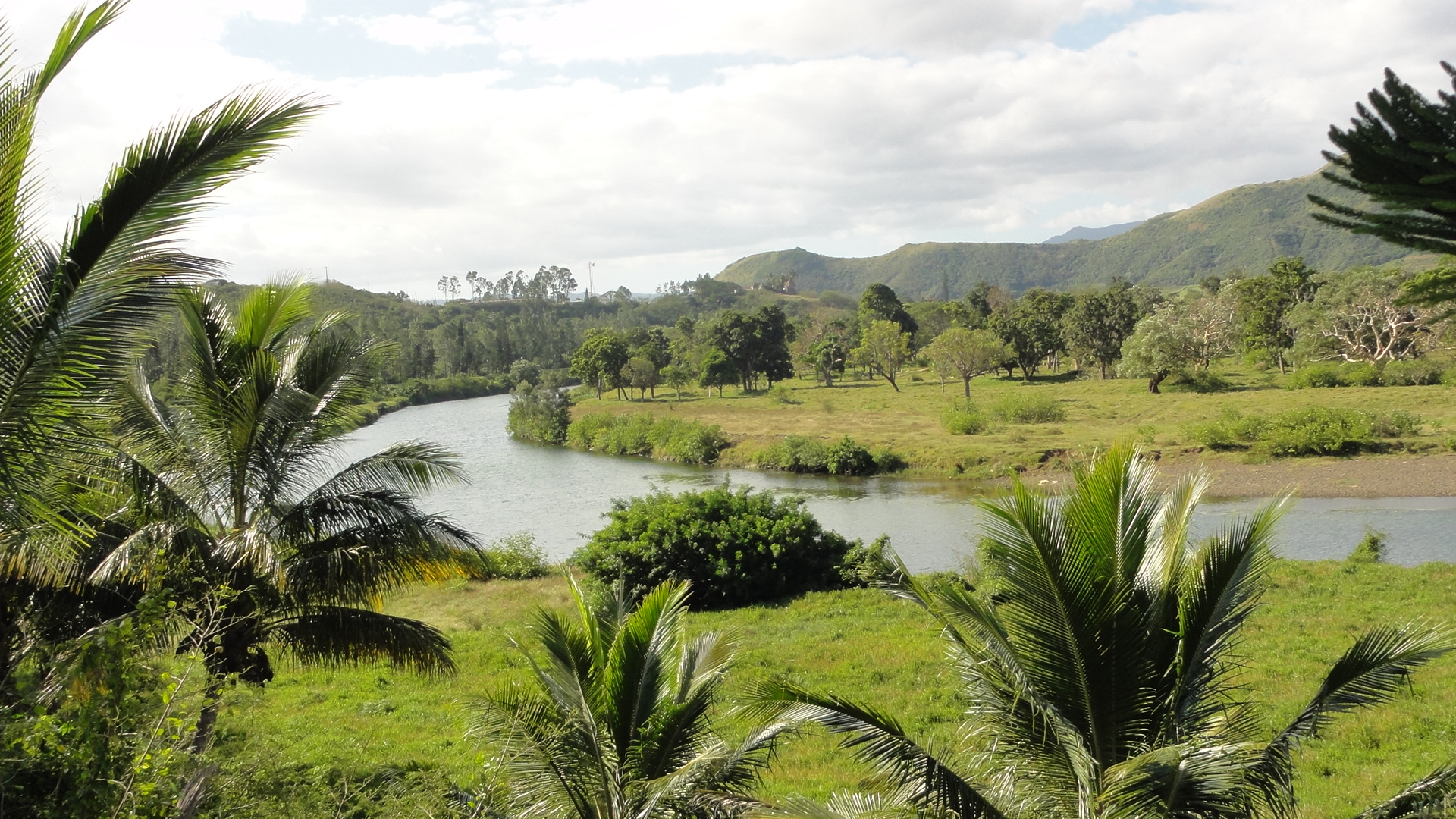 Végétation autour de la Néra